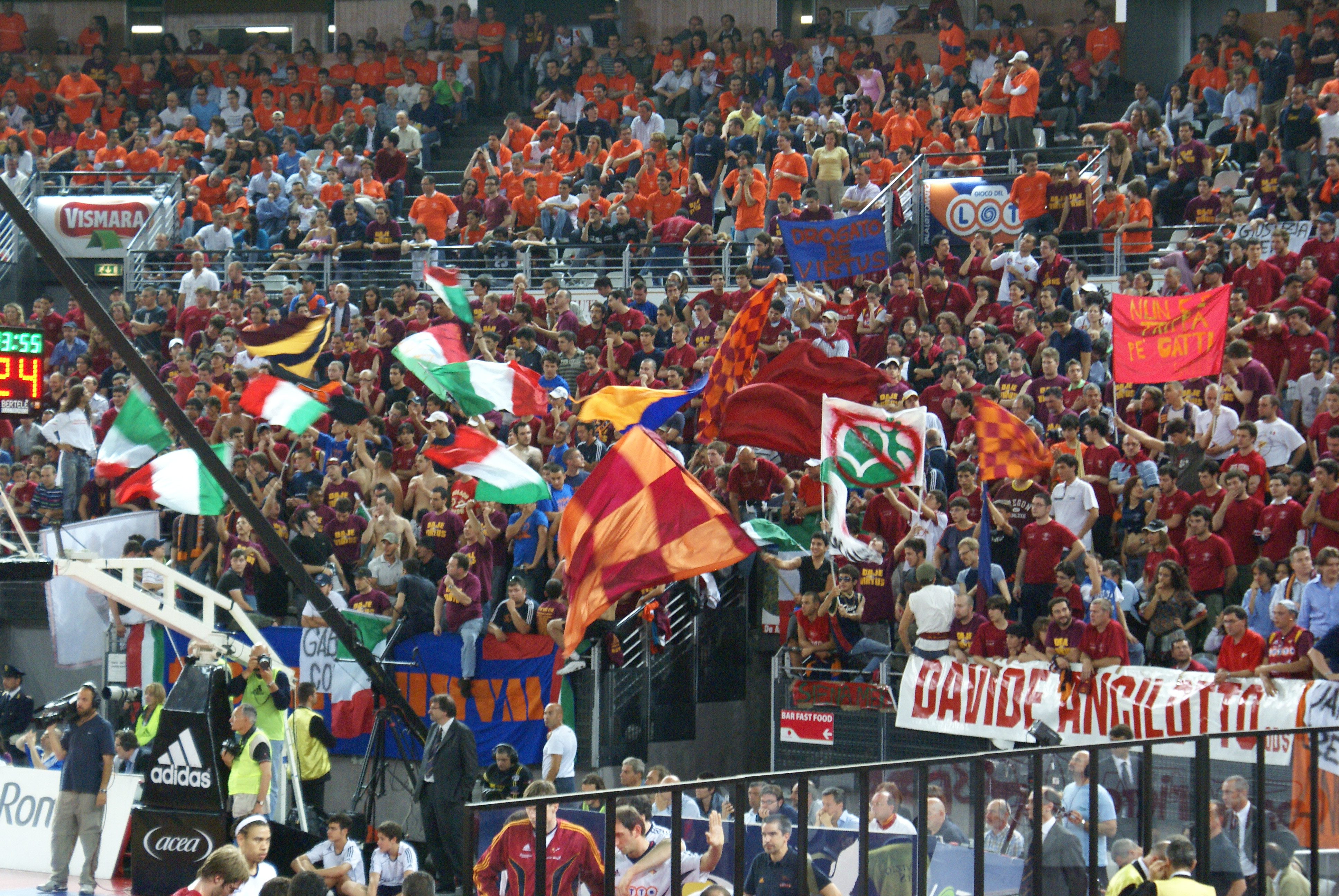 Pallacanestro Virtus Roma supporters